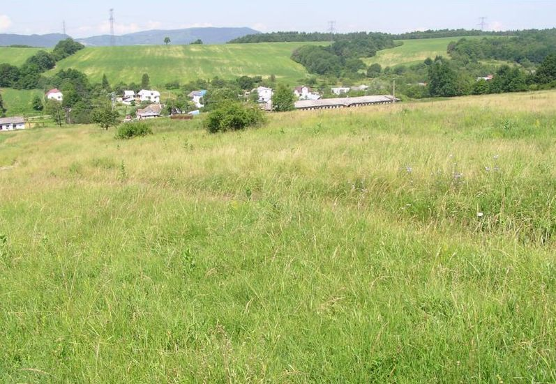 Description Celkový pohľad ano Celkový pohľad